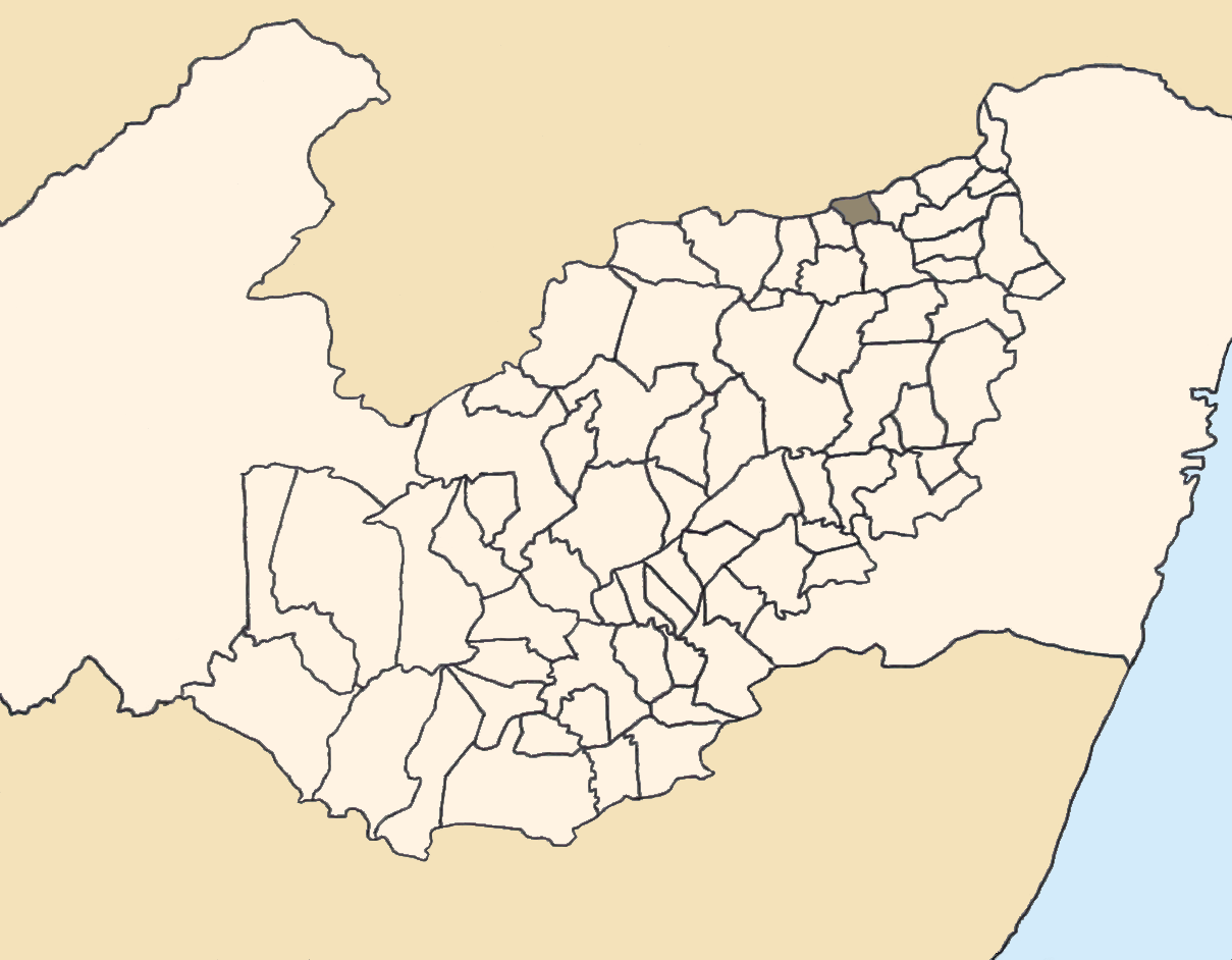 Mapa da mesorregião Agreste de Pernambuco (Brasil) subdivida em municípios. Em destaque, o município de Vertente do Lério. Map of the brazilian state of Pernambuco (mesorregião Agreste) showing the city of Vertente do Lério. Imagem tratada com o GIMP. Image made with GIMP.